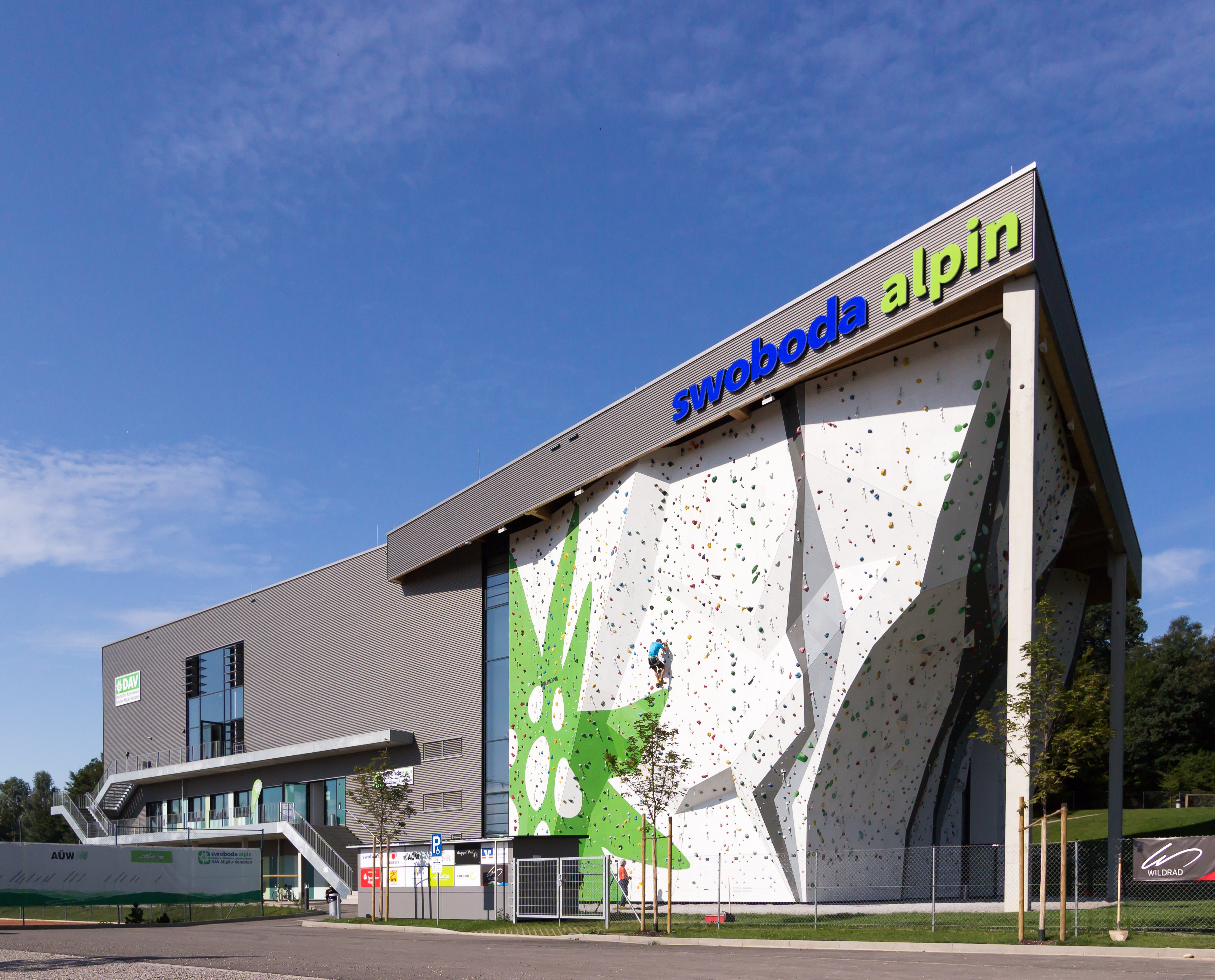 Swoboda Alpin, Aybühlweg, Kempten